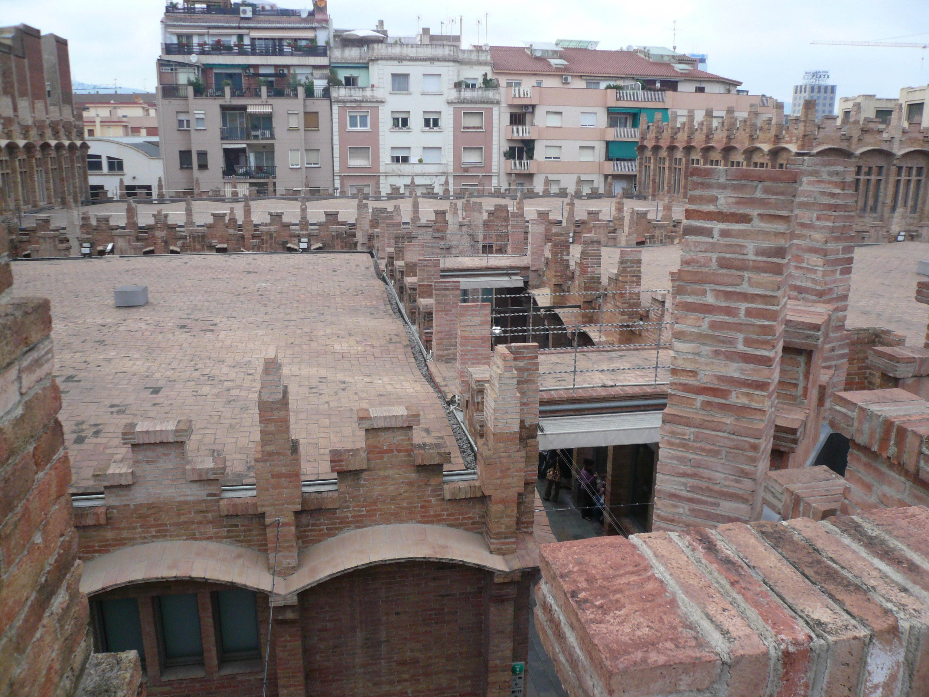 Fàbrica Casaramona (Barcelona)